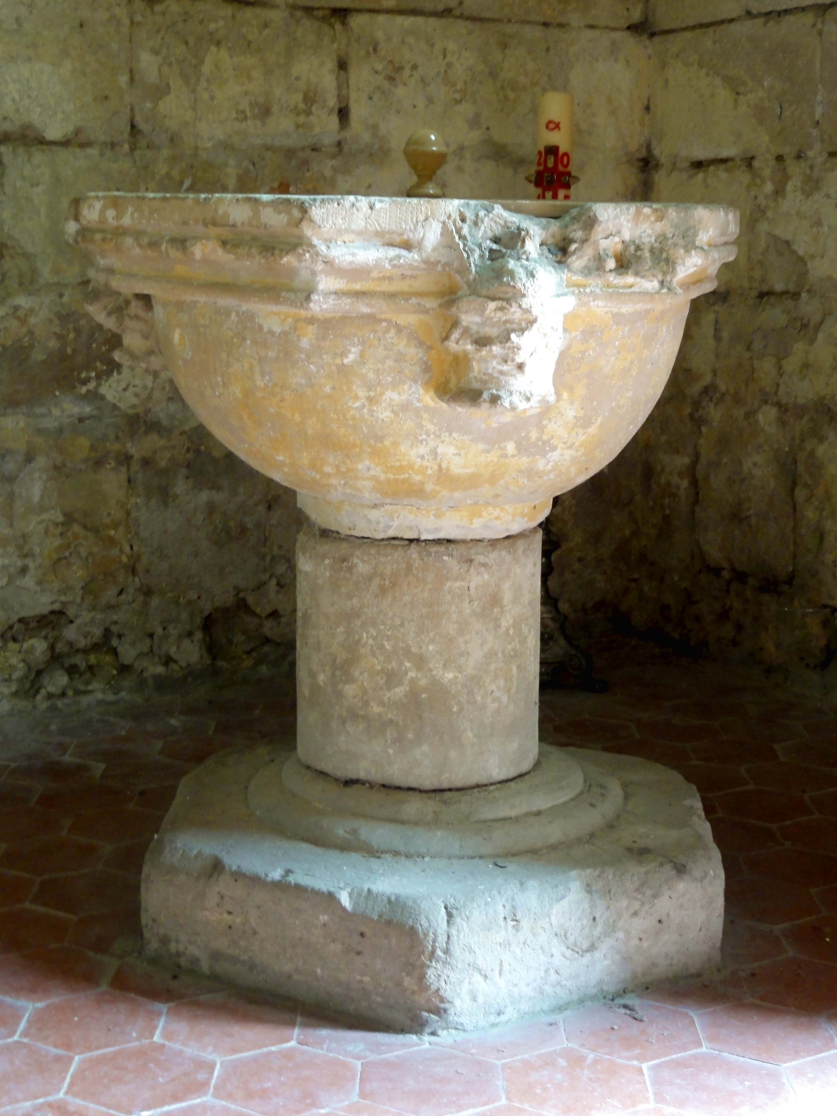 Mobilier de l'église (voir titre).